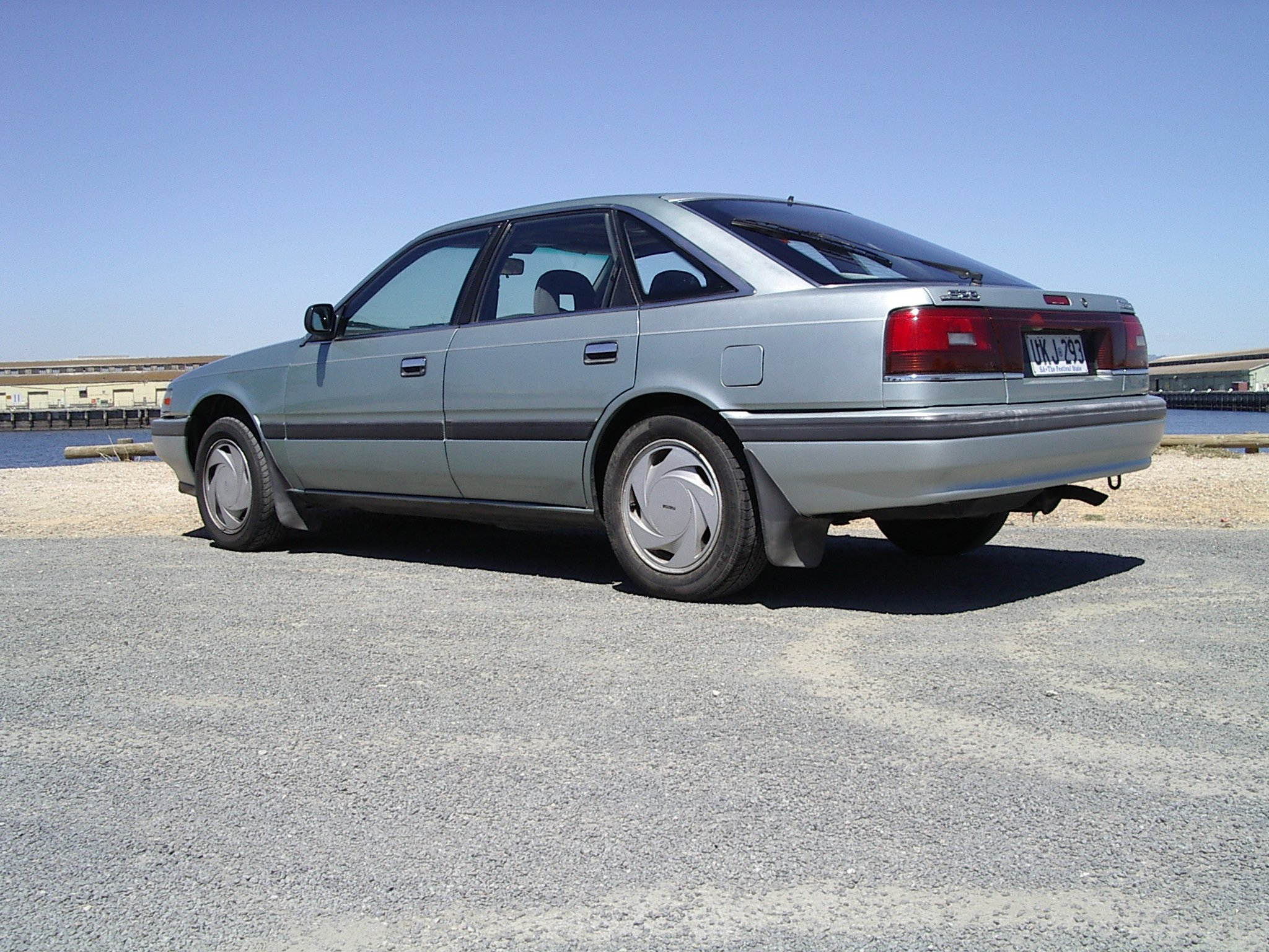 1988 Mazda 626 Turbo